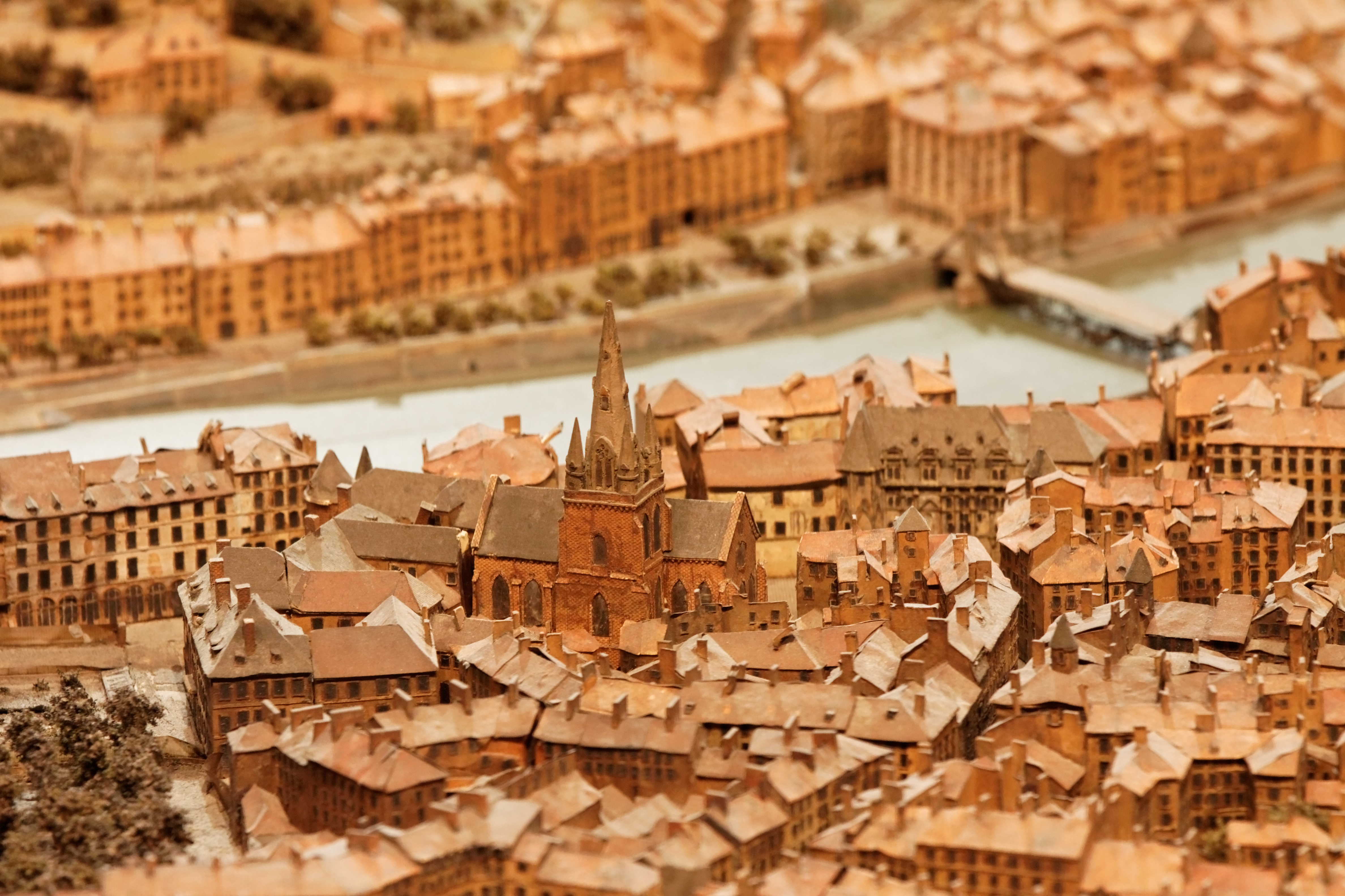 Plan-relief de Grenoble en 1848. Plan-relief construit de 1843 à 1848. Échelle 1/600e